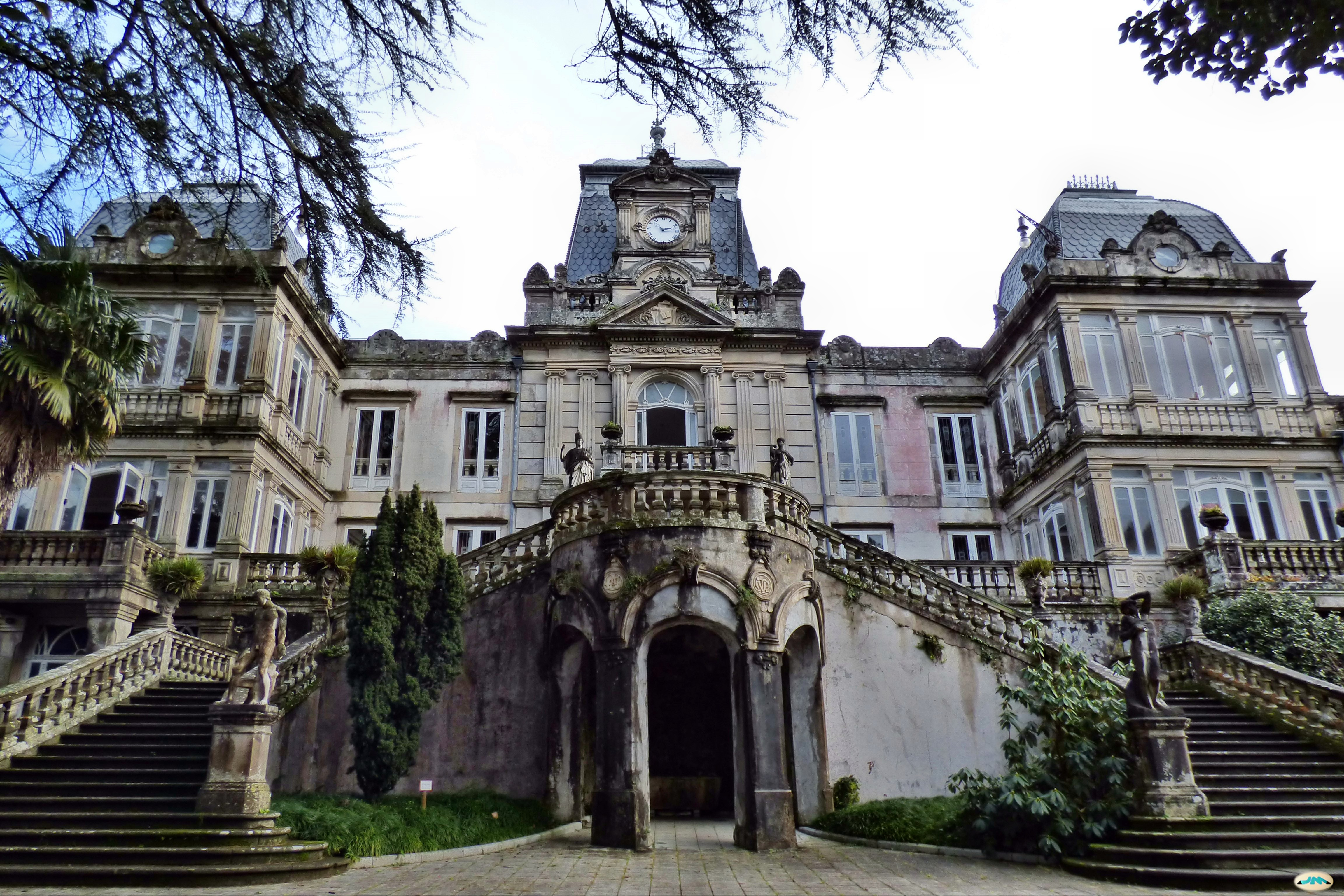 Pontevedra-Pazo de Montero Ríos en Lourizán